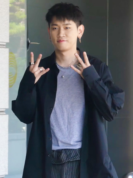 6일 오후 서울시 영등포구 여의도 KBS 별관에서 '해피투게더4' 녹화가 진행됐다. 이날 녹화는 '짝꿍 특집'으로 지상렬X신지X김종민X비와이X크러쉬와 MC 유재석, 전현무, 조세호, 조윤희가 출연한다.